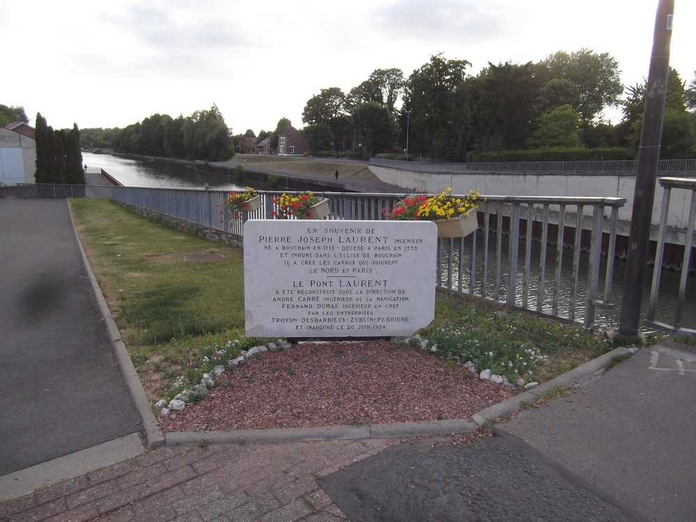 Pont LAURENT sur le canal de l'Escaut à Bouchain avec la plaque à la mémoire de Pierre Joseph LAURENT reposée le premier semestre 2015